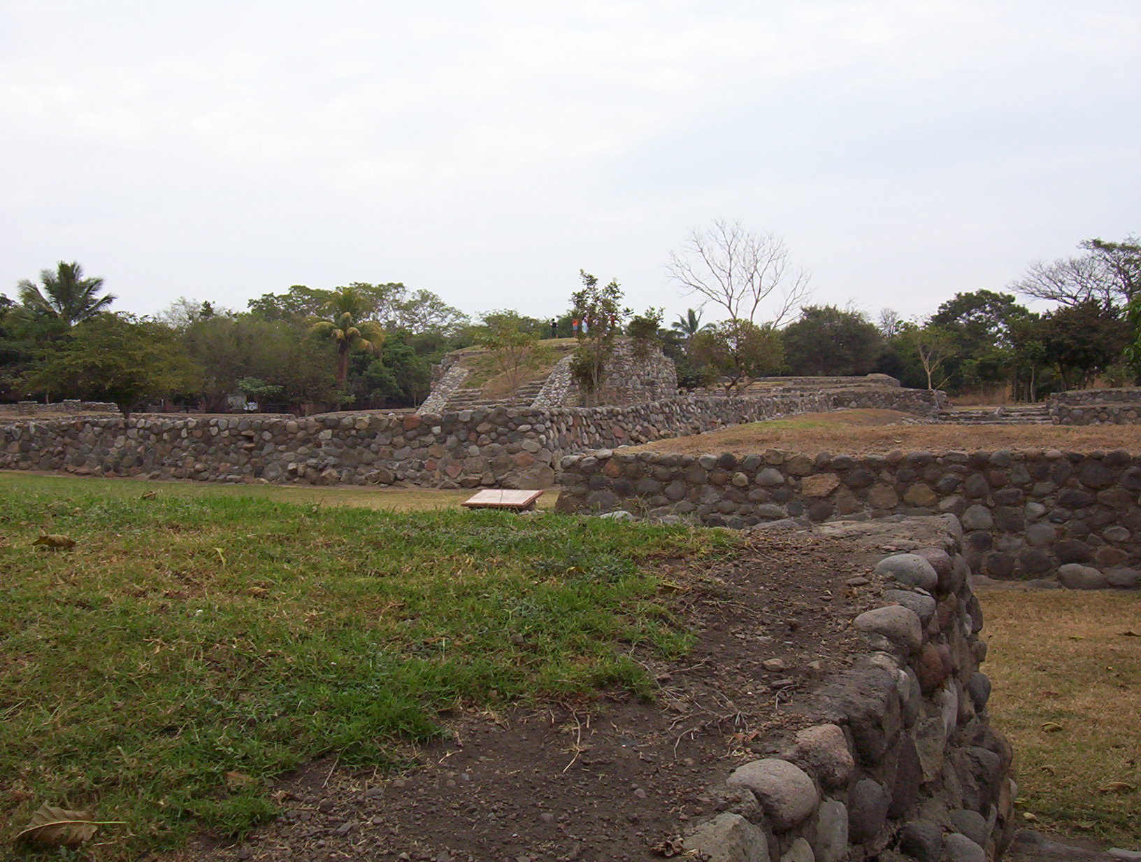 Zona Arqueológica de El Chanal en Colima, México